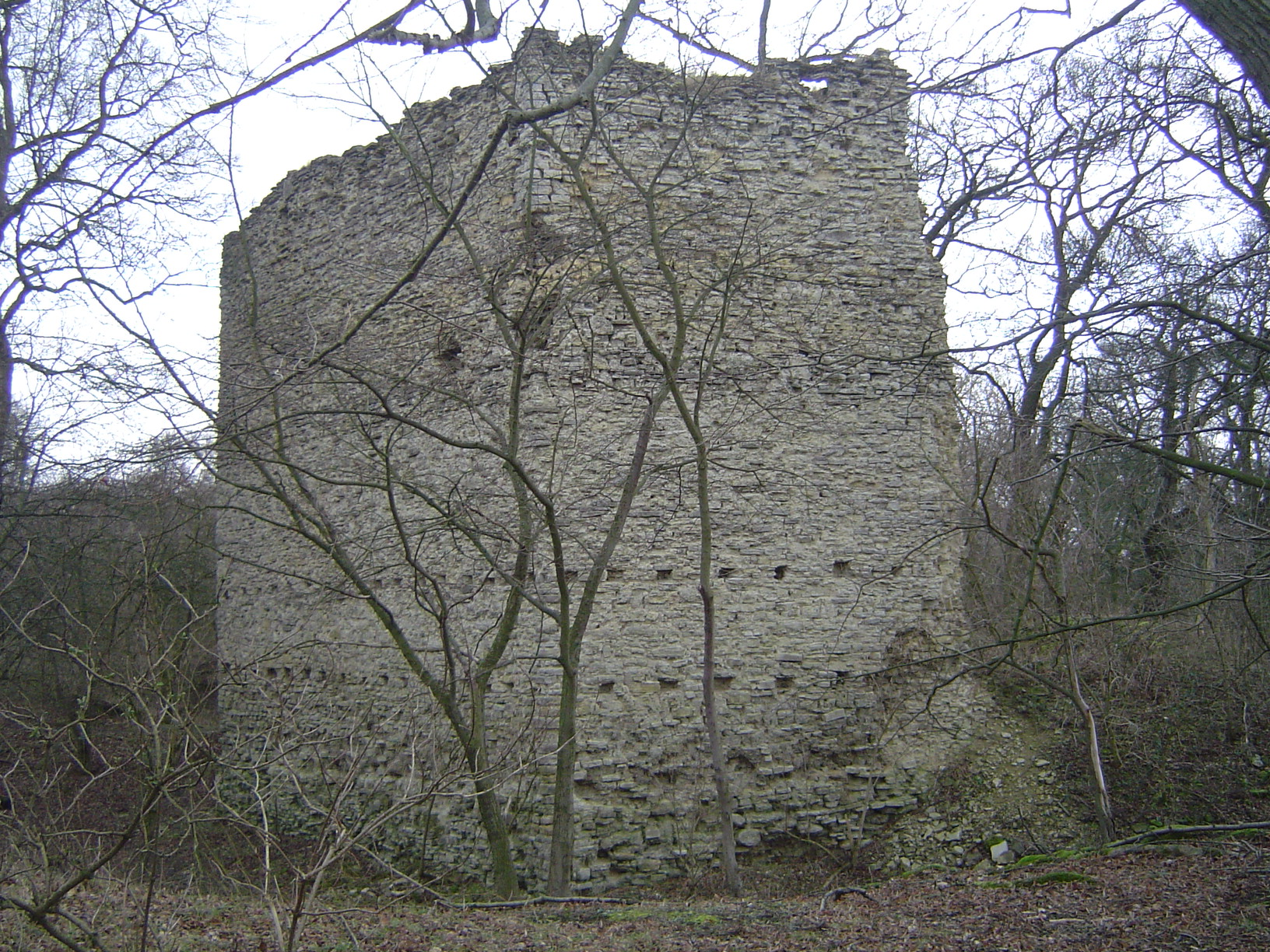 Domburg im Hakel